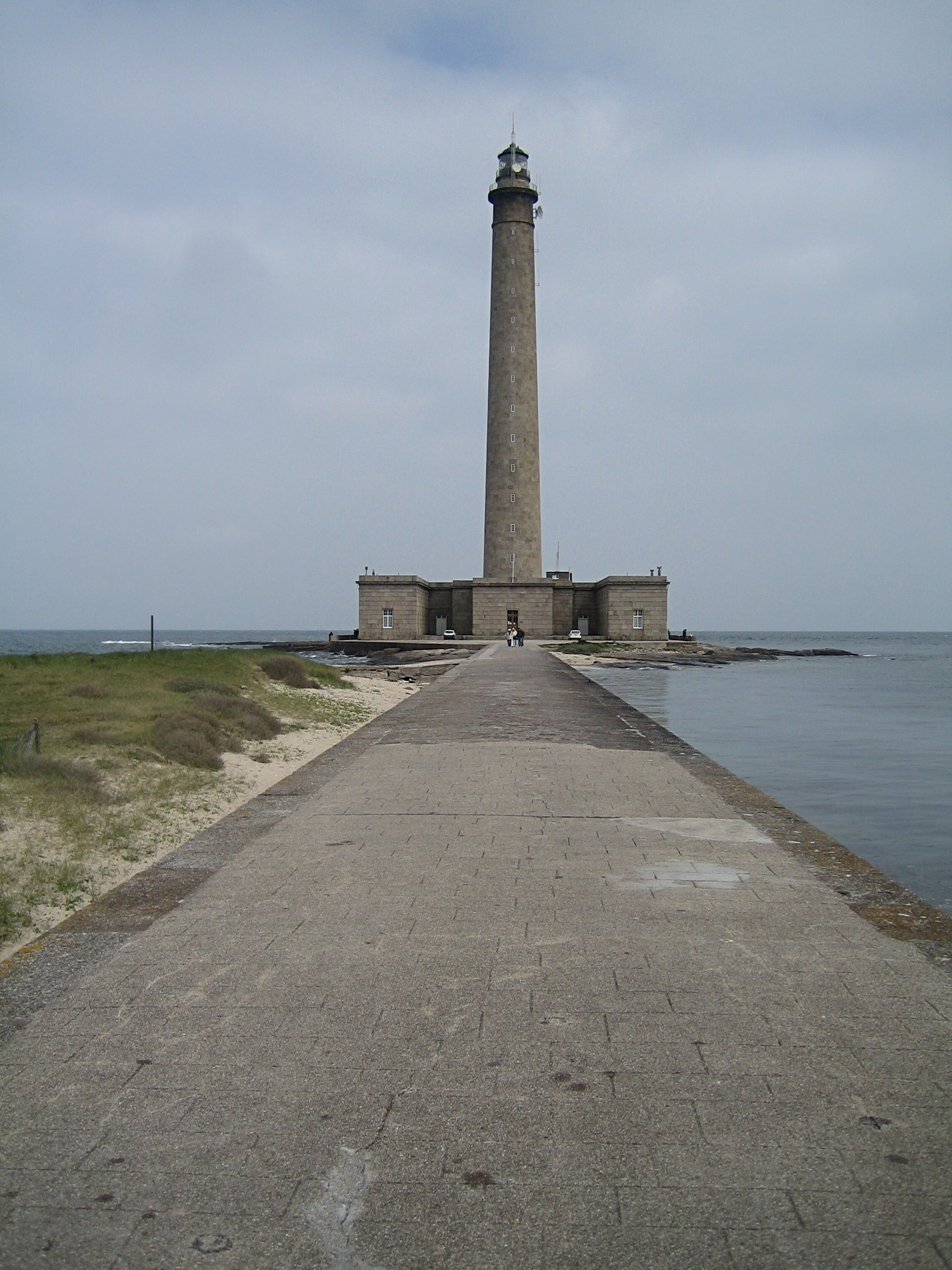 Phare de Gatteville (Cotentin, France, near Cherbourg)